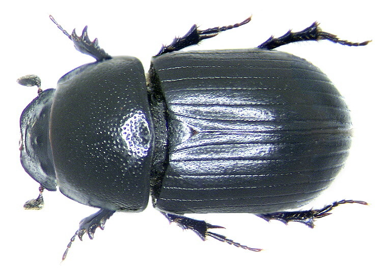 Familie: Scarabaeidae Grösse: 3-5,5 mm Verbreitung: Nordafrika, Europa, Sibirien Fundort: Germania, Oberfranken, Rudolphstein leg.det. U.Schmidt, 2002 Foto: U.Schmidt, 2006